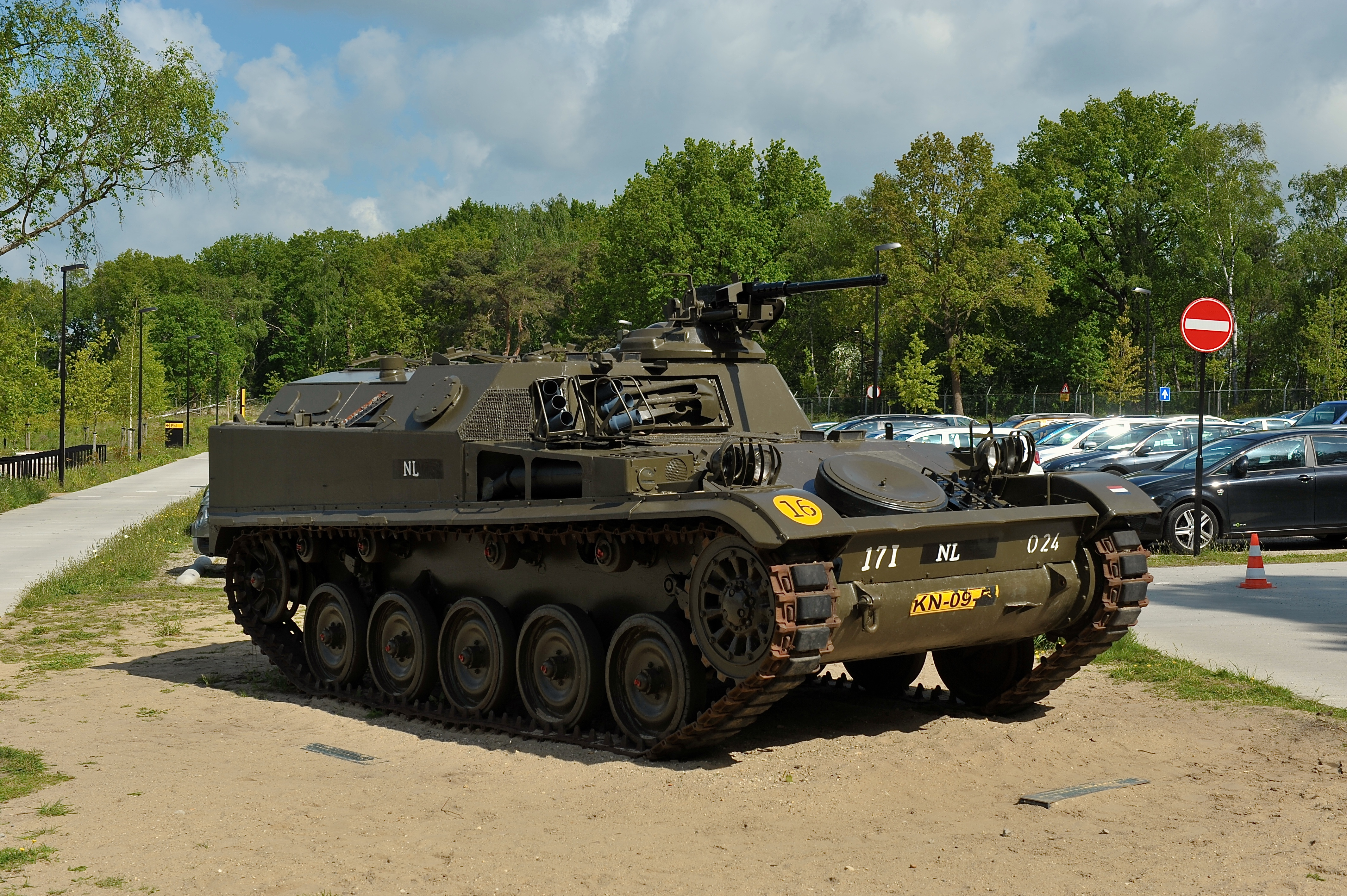 De AMX-PRI was een Frans Infanteriegevechtsvoertuig. Deze voertuigen werden vooral ingezet bij de pantserinfanterie. In het Nederlandse leger zijn de voertuigen ongeveer 20 jaar in dienst geweest tot ze in 1978 zijn vervangen door de YPR-765.